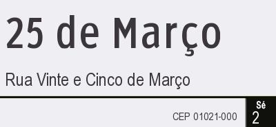 Diagrama de placa de identificação da avenida Paulista em São Paulo.